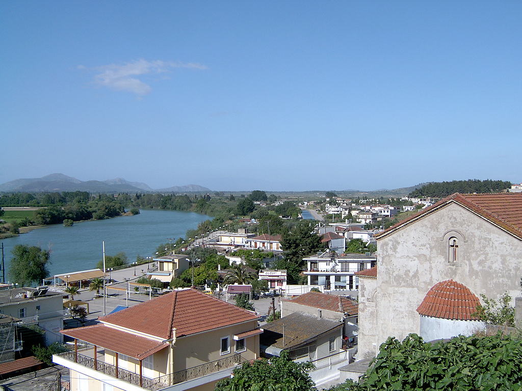 Κατοχή - Αχελώος